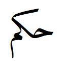 Хакам